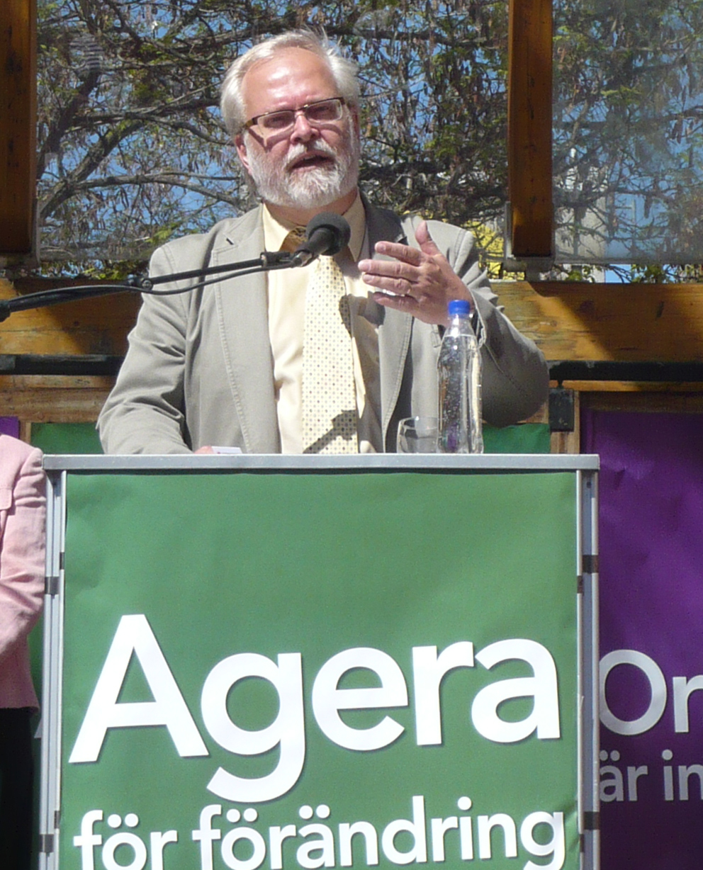 Göran Färm i Västerås inför EU-valet.